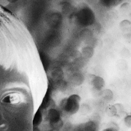 Korn bei einem Schwarzweißfilm mit ISO 25